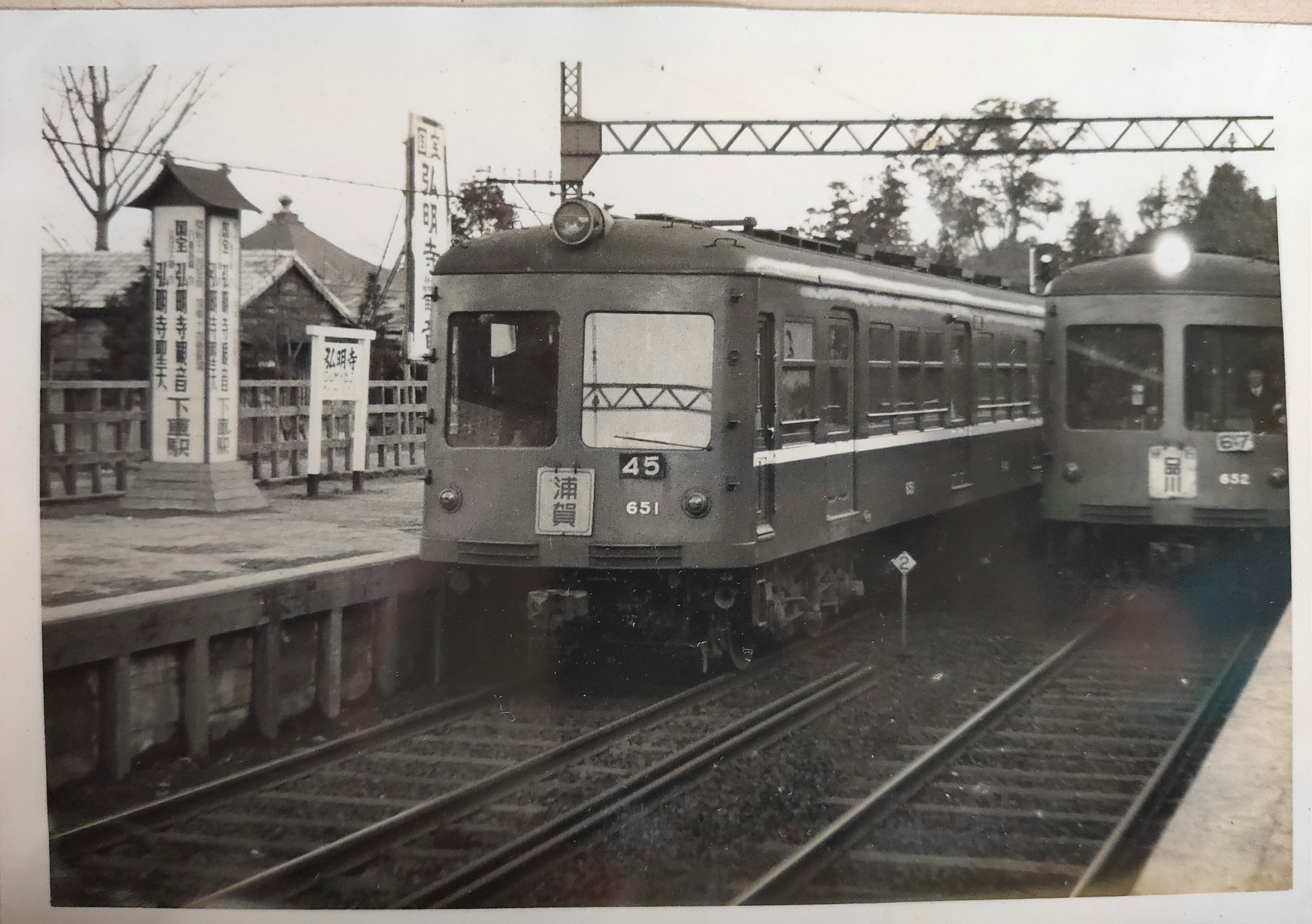 弘明寺駅での浦賀行クハ651と品川行クハ652 昭和29年弘明寺駅にて撮影